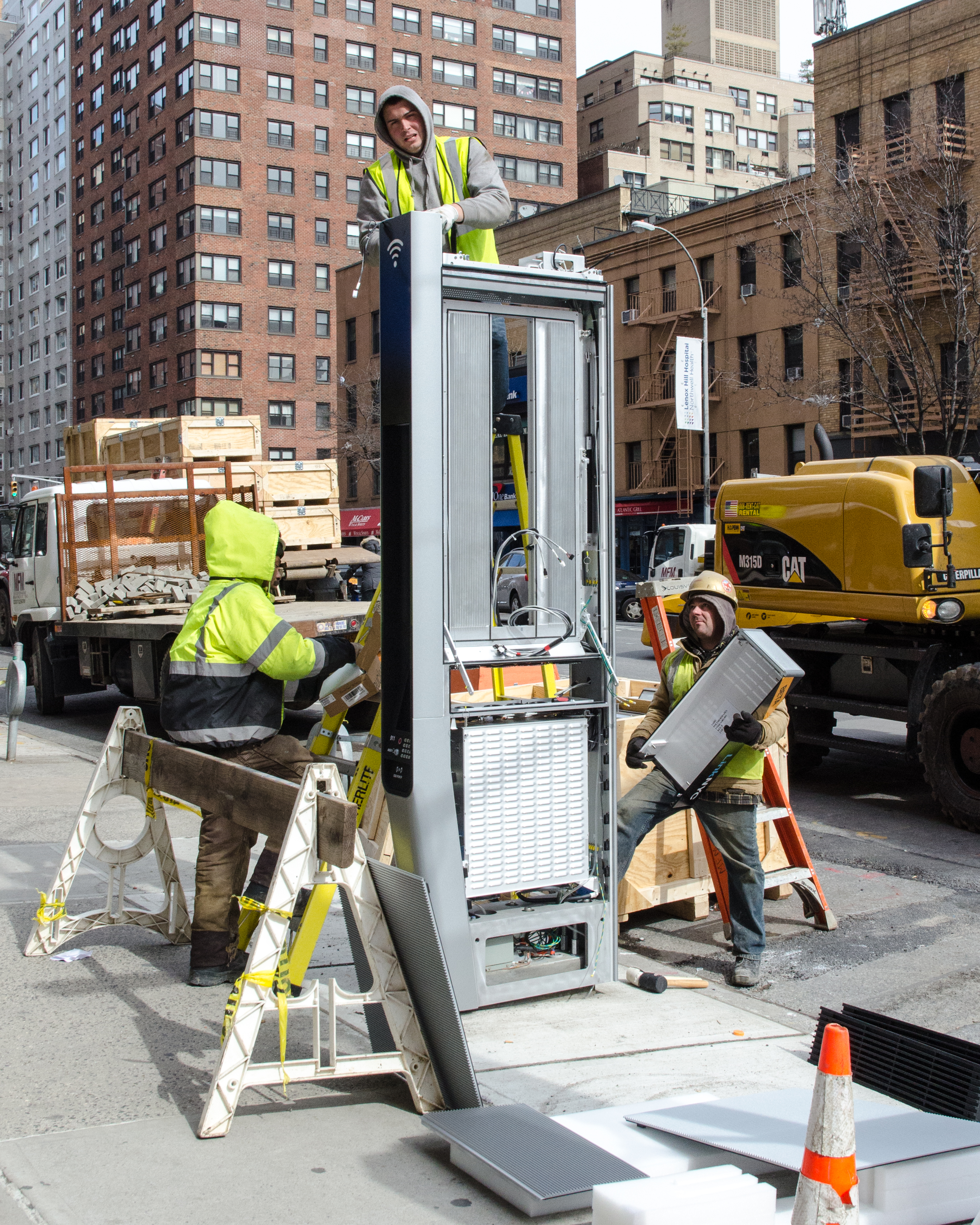 EHB_1773